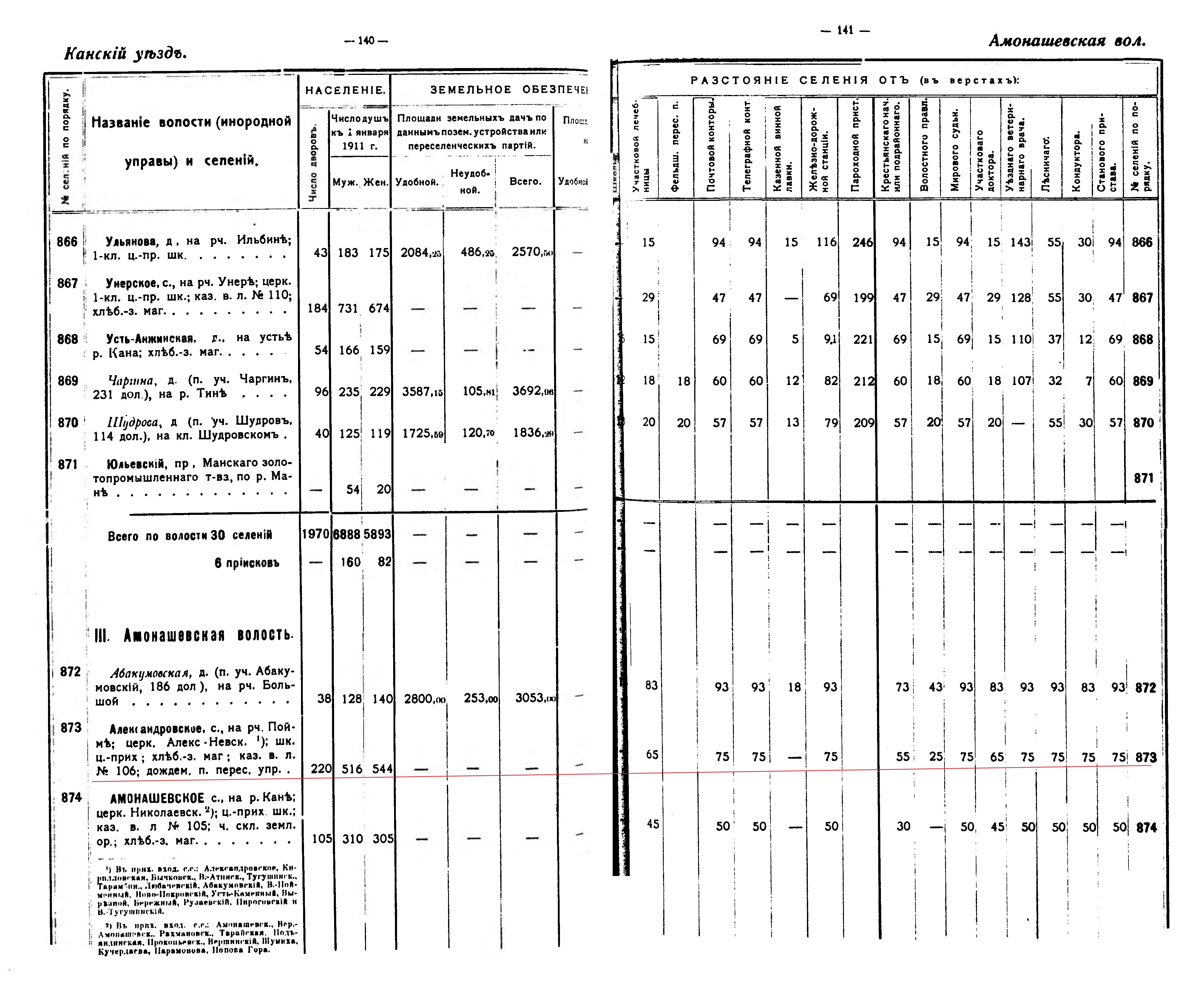 Статистические данные по с. Александровскому в 1911 из "Список* НАСЕЛЕННЫХЪ ПУНКТОВЪ Енисейской губернии (съ приложешемъ списка русскихъ поселений въ Урянхайскомъ Кратъ схематической карты волостей Енисейской губернии).